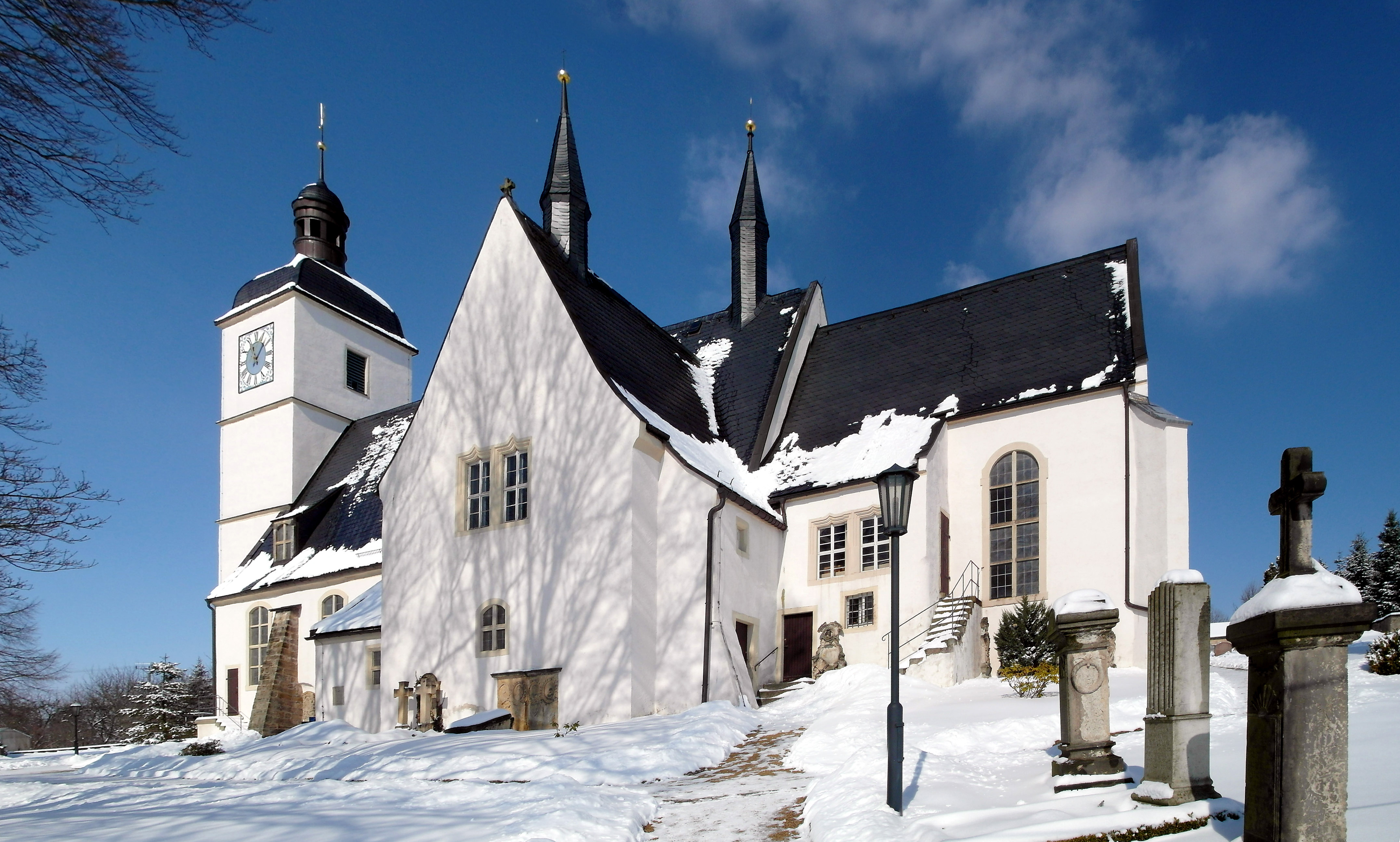 Kirche Reinhardtsgrimma (GMP: 50.893779,13.753364)